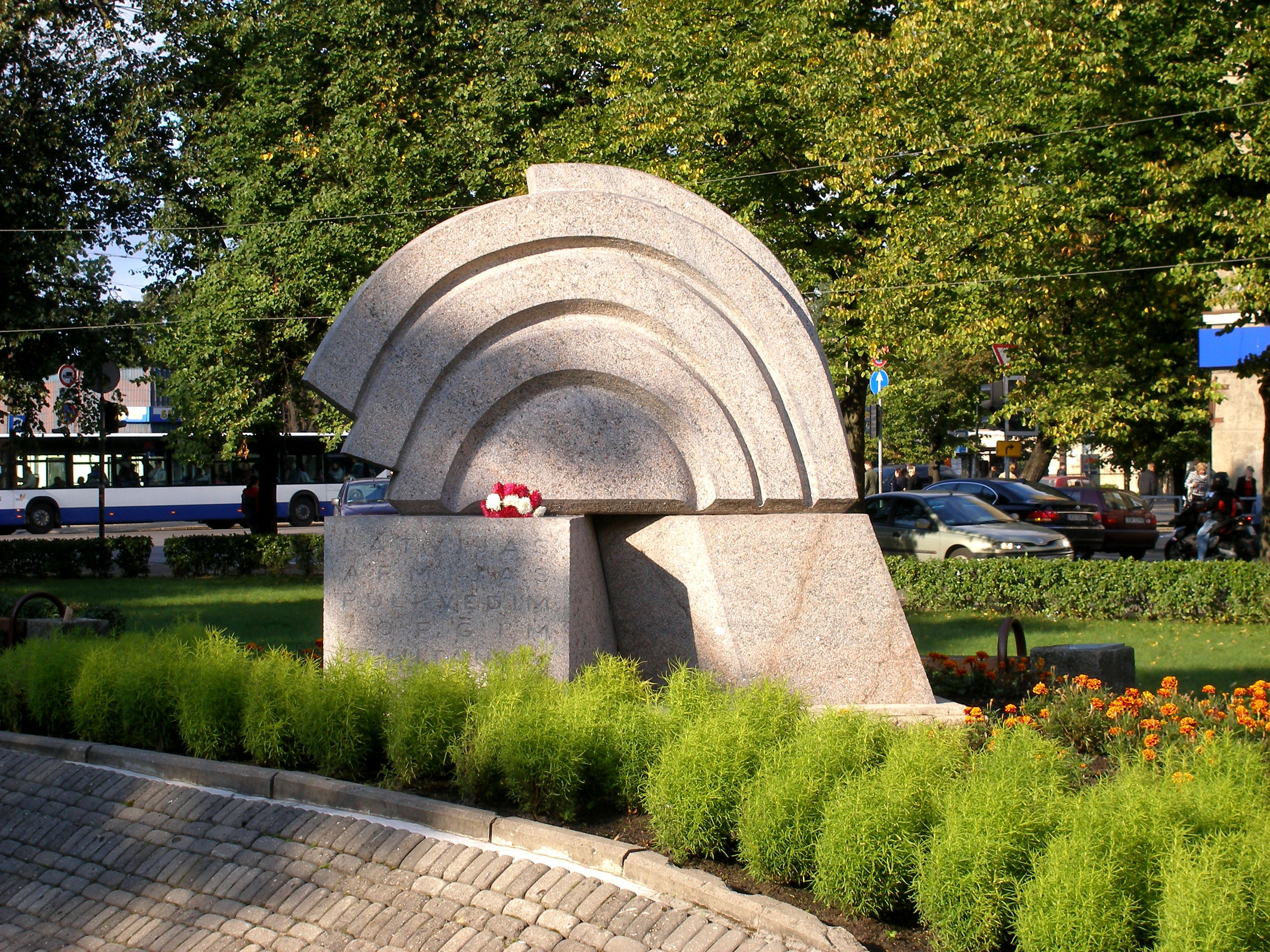 Piemineklis Jorģim Zemitānam Rīgā, Zemitāna laukumā